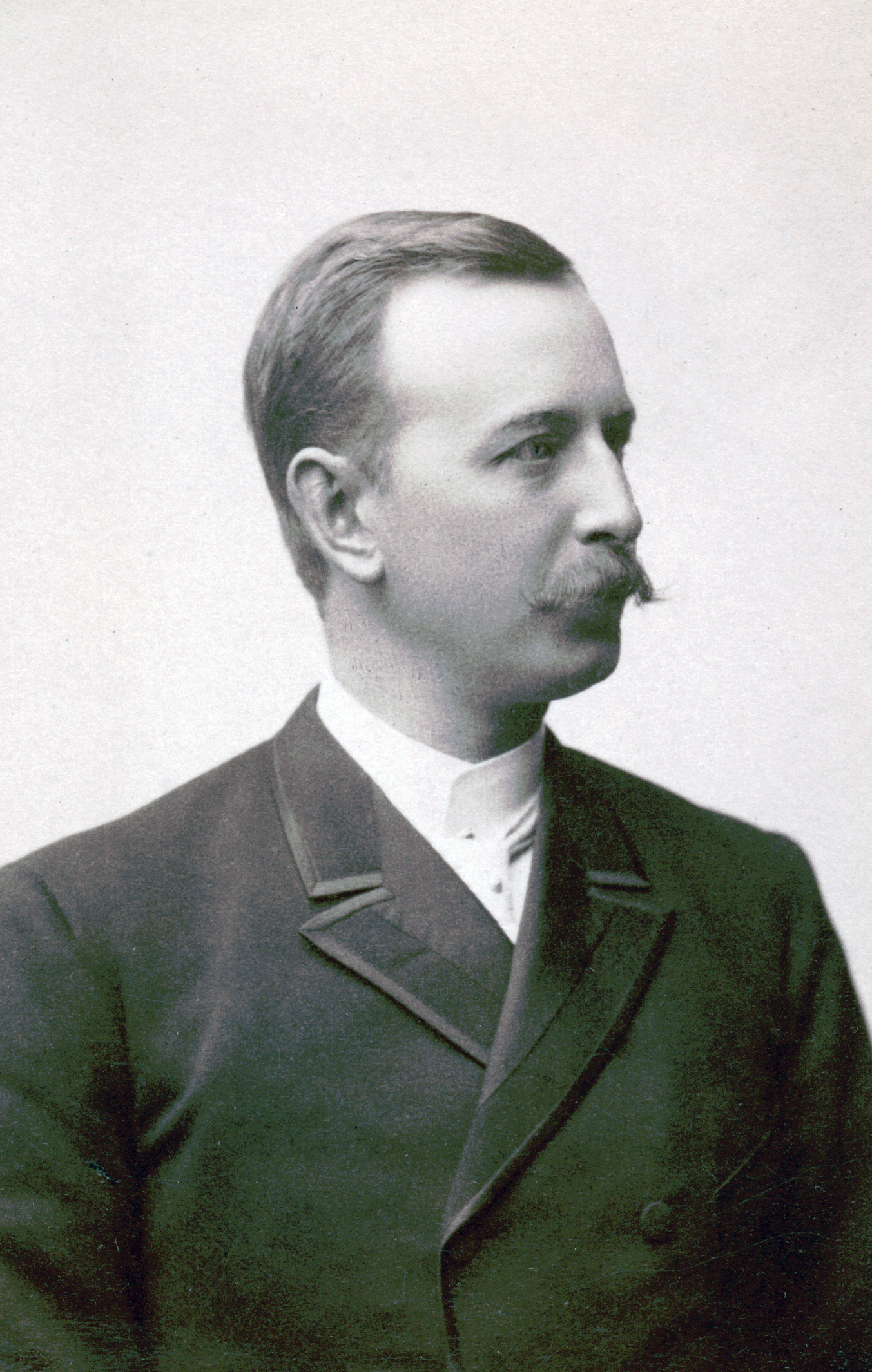 Oscar Lejdström, sångare vid Kungliga Operan 1888